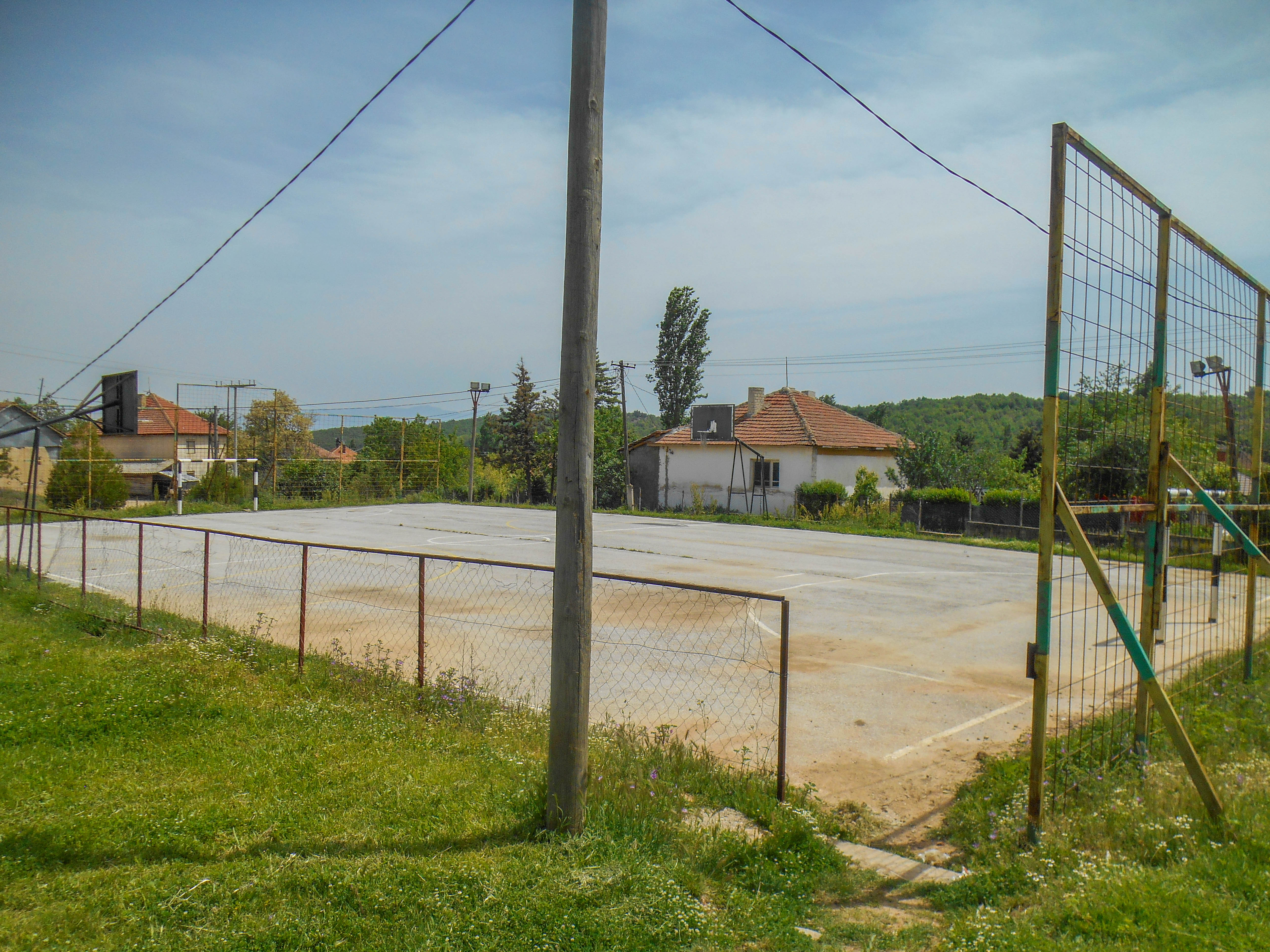 Спортско игралиште